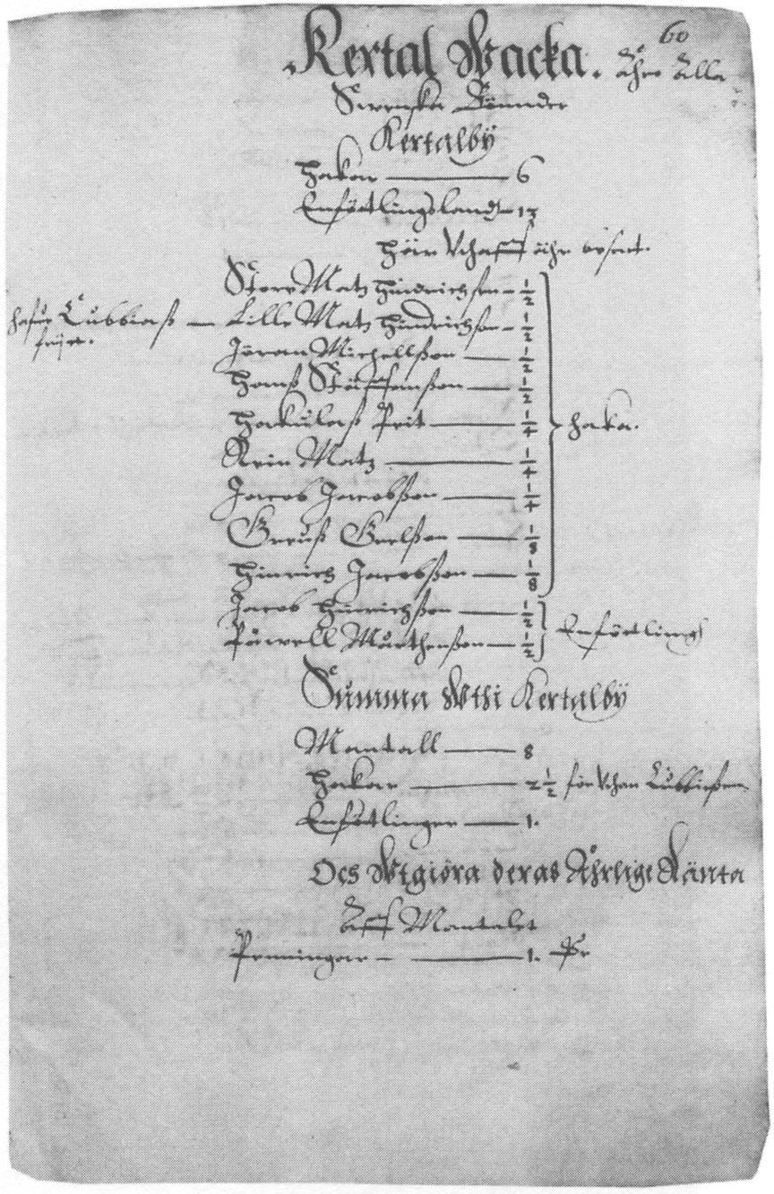 Vackebok av yngre typ med anteckningar om svenska bönder (kronolandbor) på Dagö år 1612.